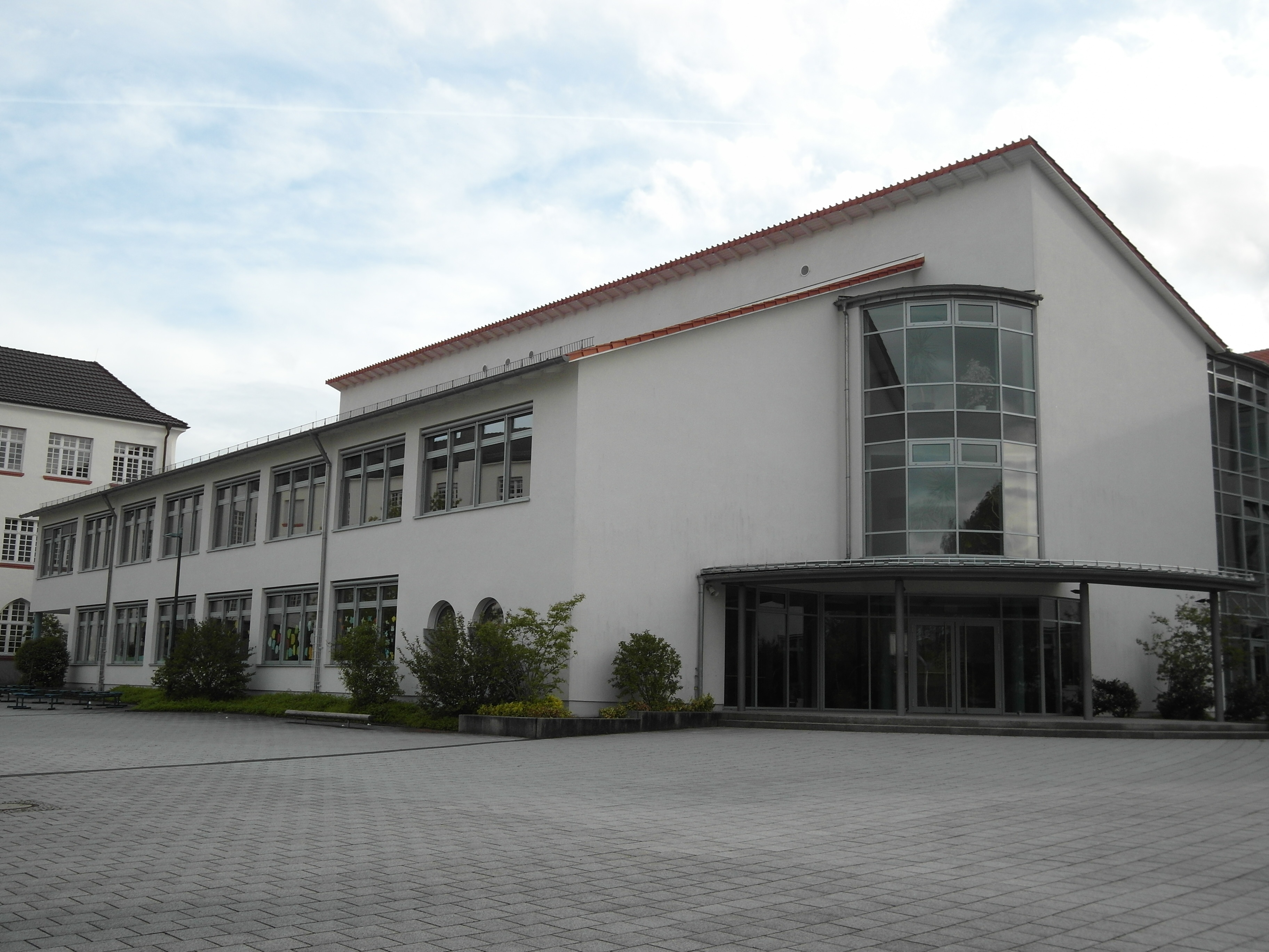 Dieses Foto zeigt das Gerhardingerhaus der Schulen der Brede.